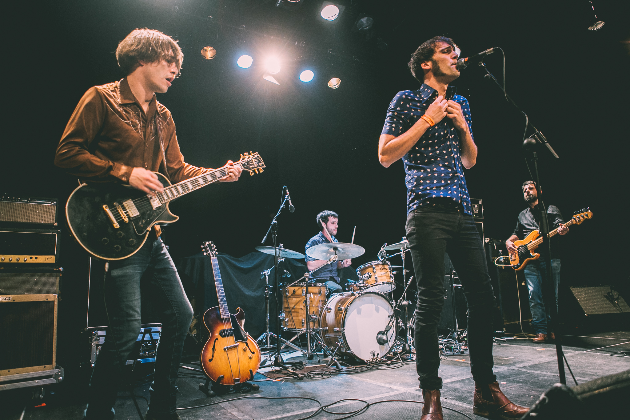 Audience Dkluba kontzertua Intxaurrondo K.E.an. Argazkiak/fotos: Lorena Otero 2017/12/16